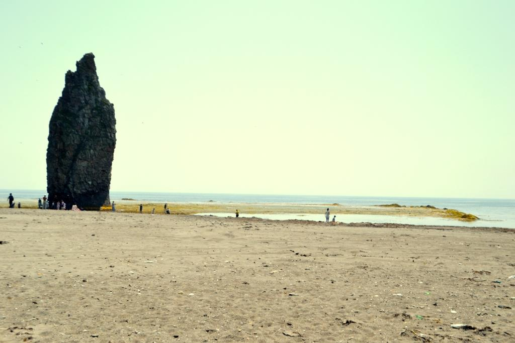 Кекур "Чертов палец" возле села Отрада